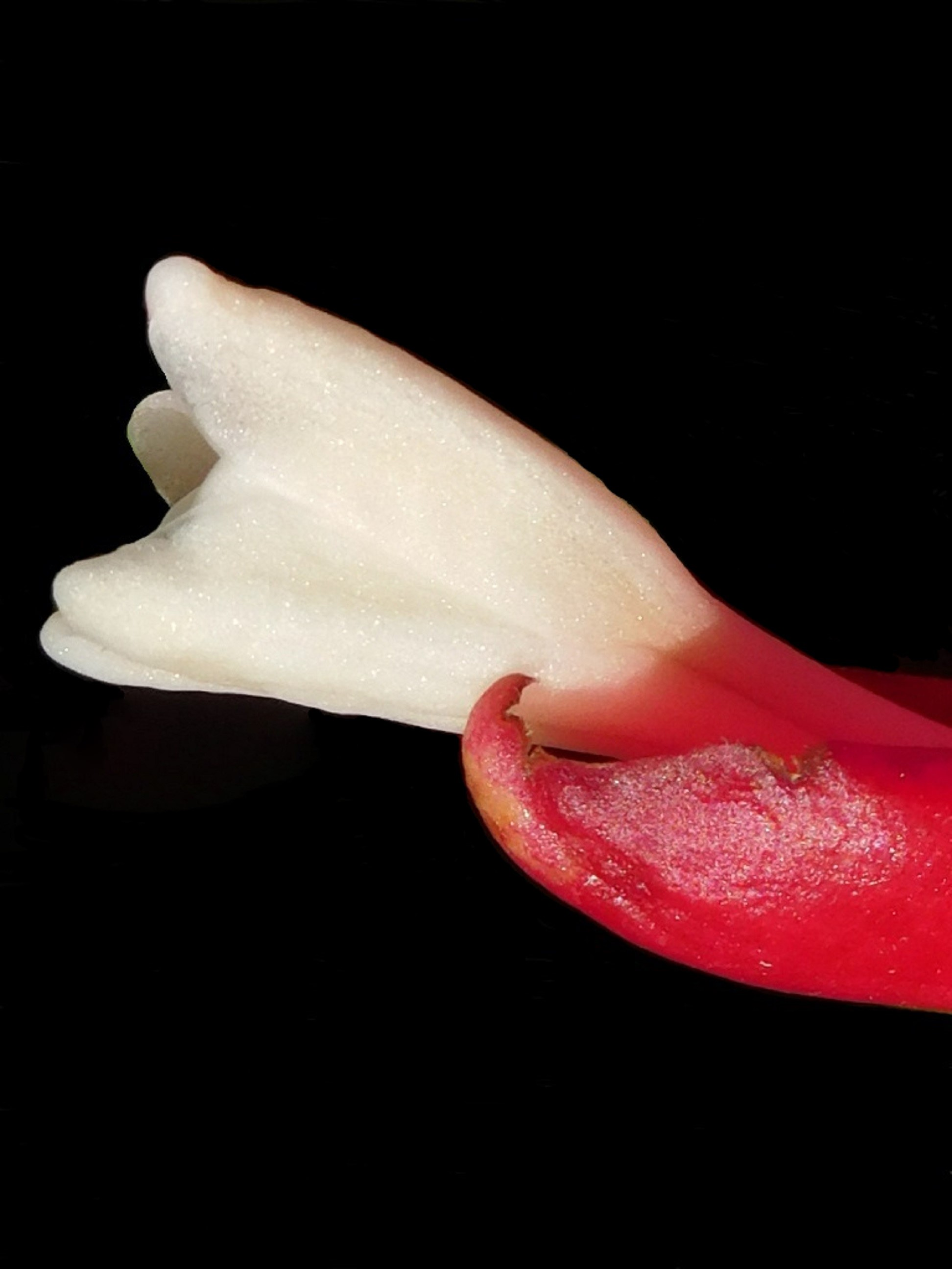 Fleur d' Alpinia purpurata sur fond noir